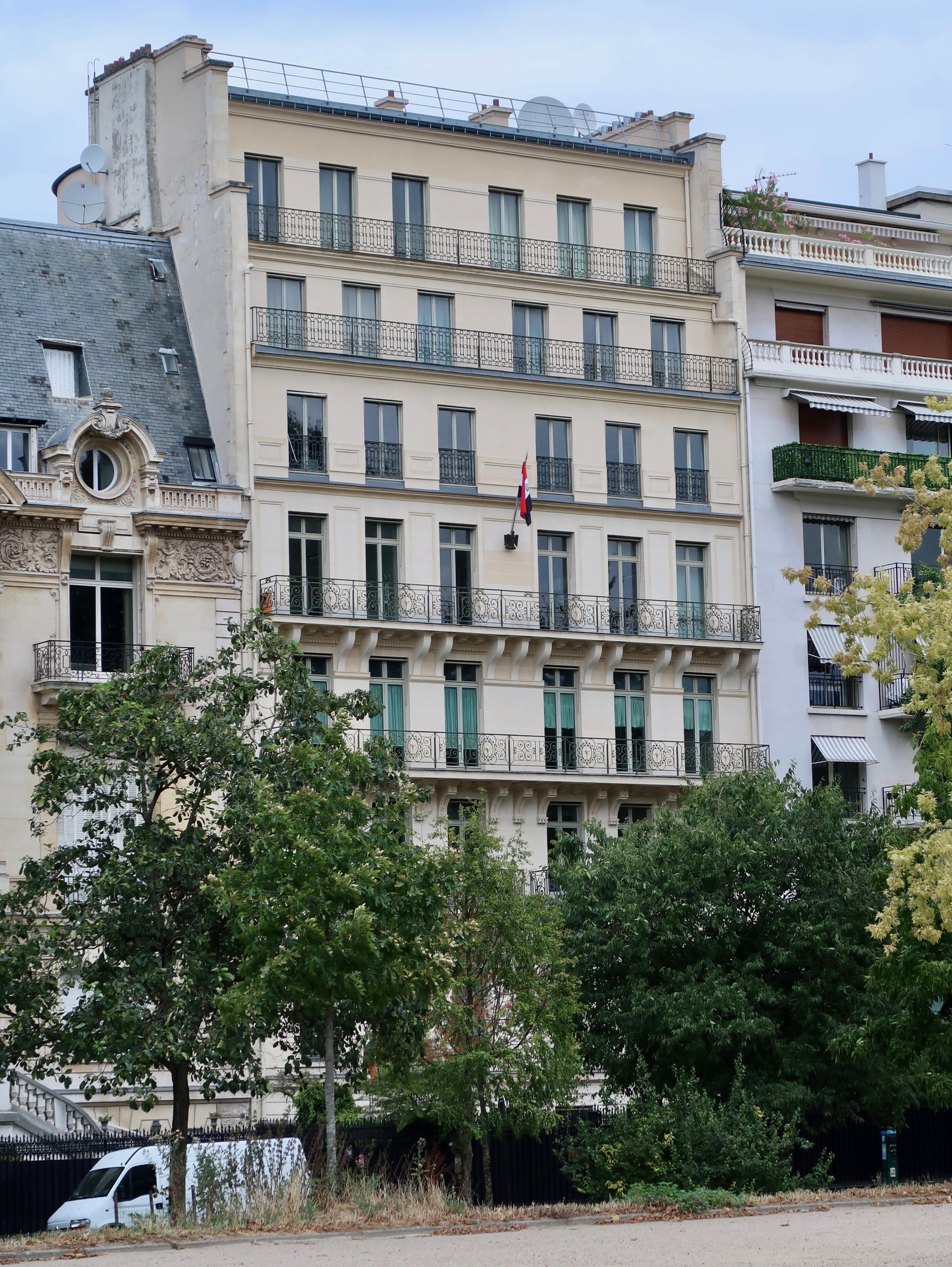 Ambassade d'Irak en France, n°64 avenue Foch (Paris, 16e).